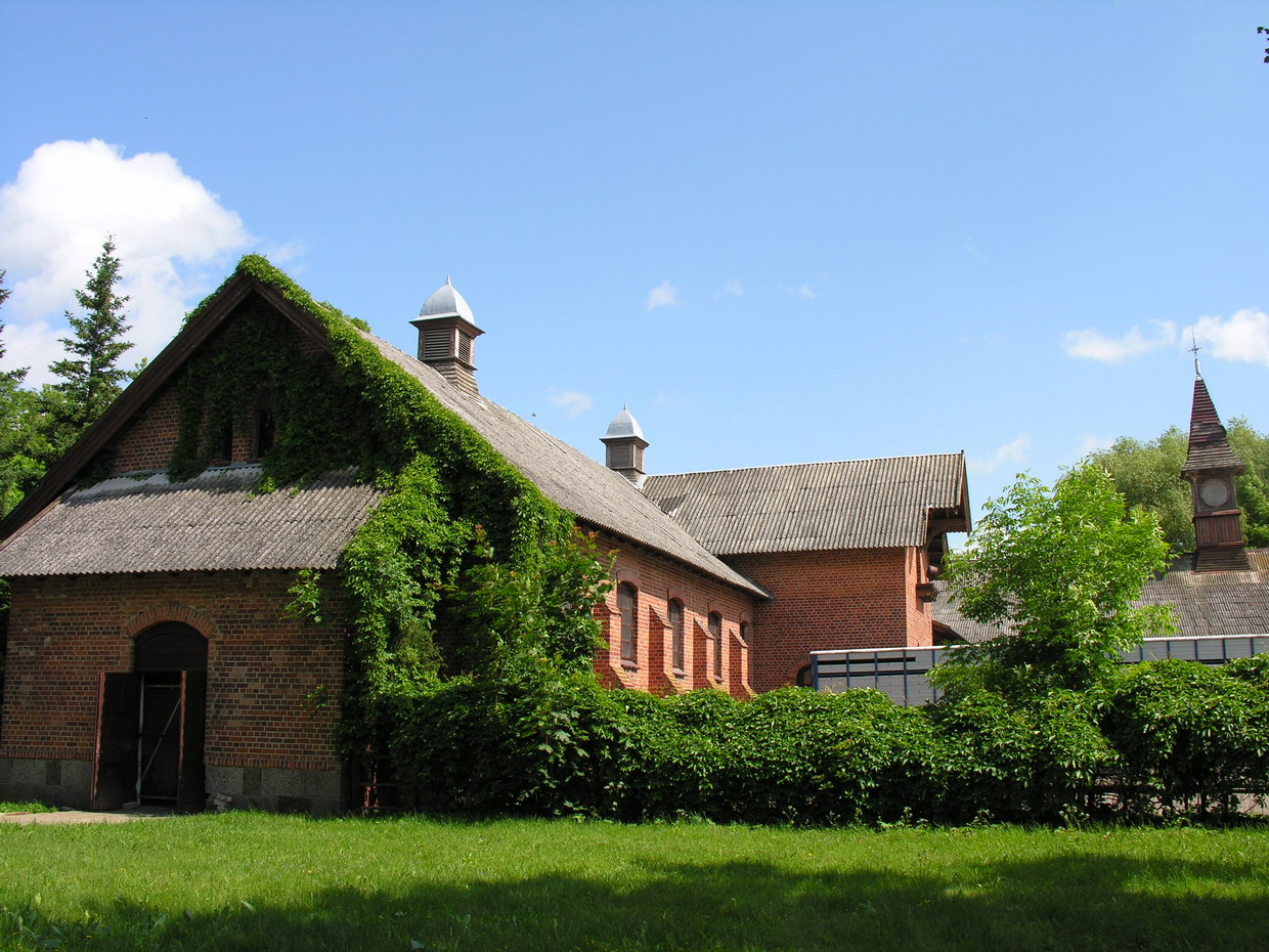 Žagarės regioninis parkas: Žagarės žirgynas